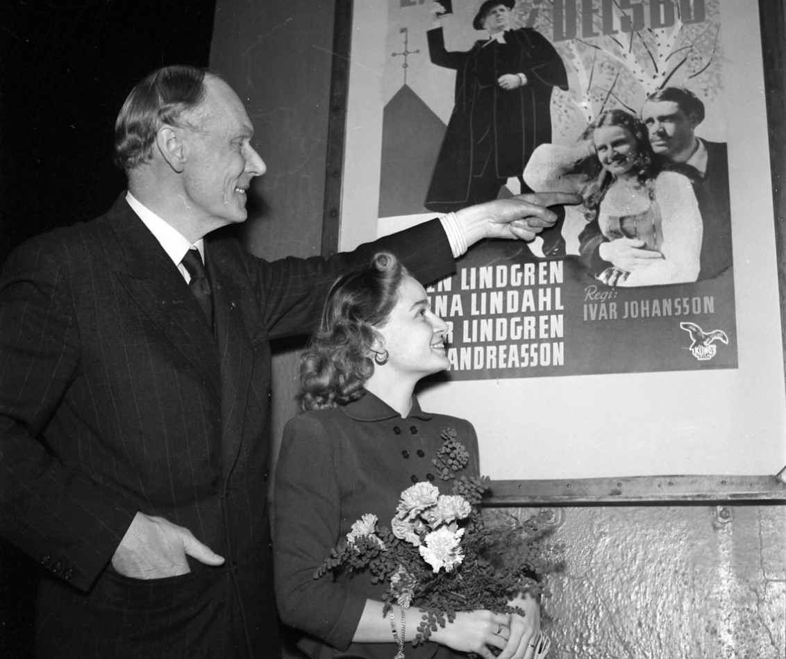 Beskrivning från digitaltmuseum.se: "Filmskådespelerskan Ulla Andreasson och direktör Hagelby vid en filmaffisch för filmen Lång-Lasse i Delsbo (premiär 1949)."